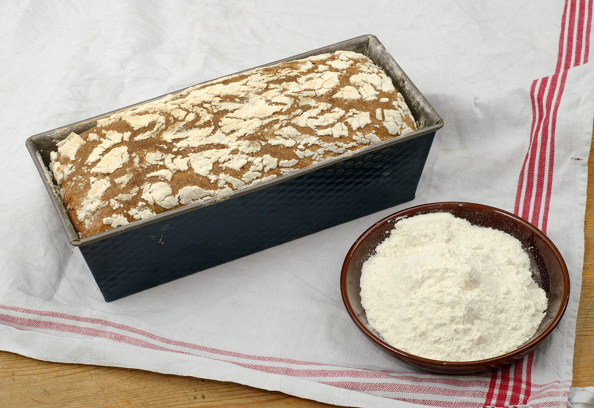 Beschichtete Kastenform mit Brot